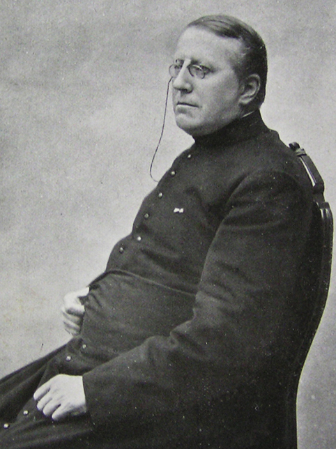 Joseph Marie Martin Van den Gheyn, né le 25 mai 1854 à Gand (Belgique) et décédé le 29 janvier 1913 à Bruxelles, est un prêtre jésuite belge. Bollandiste, il est connu comme ethnologue, anthropologue, paléographe et sanscritologue